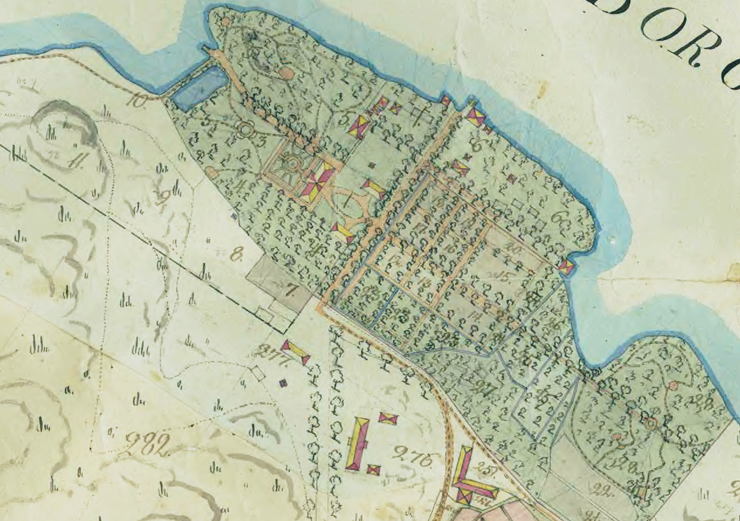 Del av karta över Skårby säteri, visande huvudbebyggelsen.